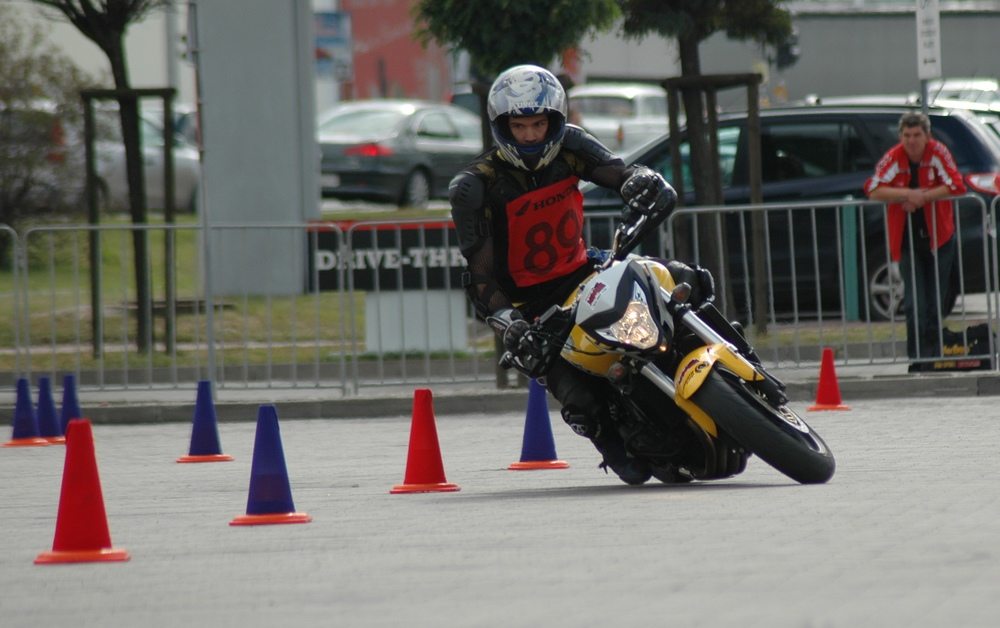 Beniamin Mucha, vicemistrz sezonu 2012 Honda Gymkhana, w czasie przejazdu na rundzie finałowej, Warszawa - Marki, 16 września 2012